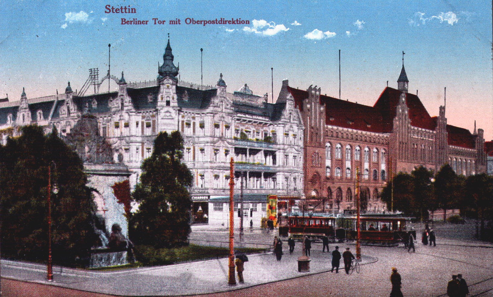 Szczecin na starej fotografii